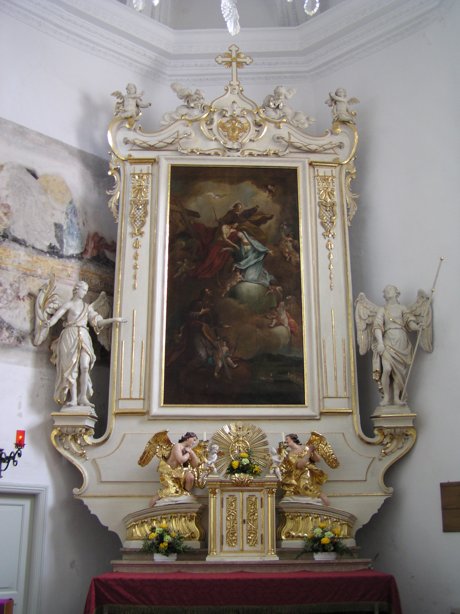 Schloss Ort am Traunsee bei Gmunden, Österreich